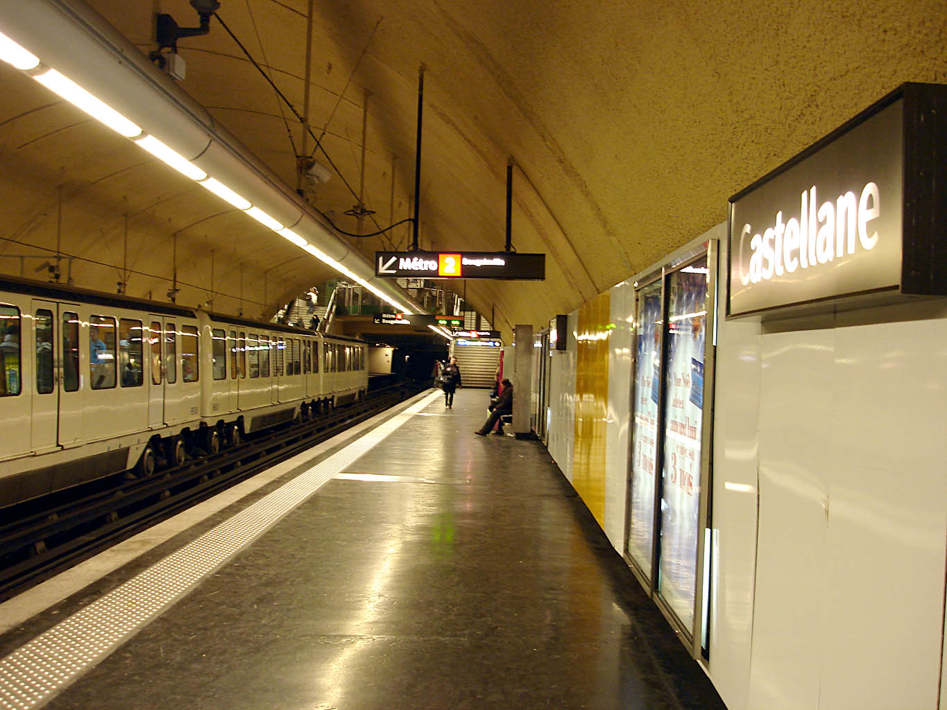 Station Castellane du métro de Marseille, France.